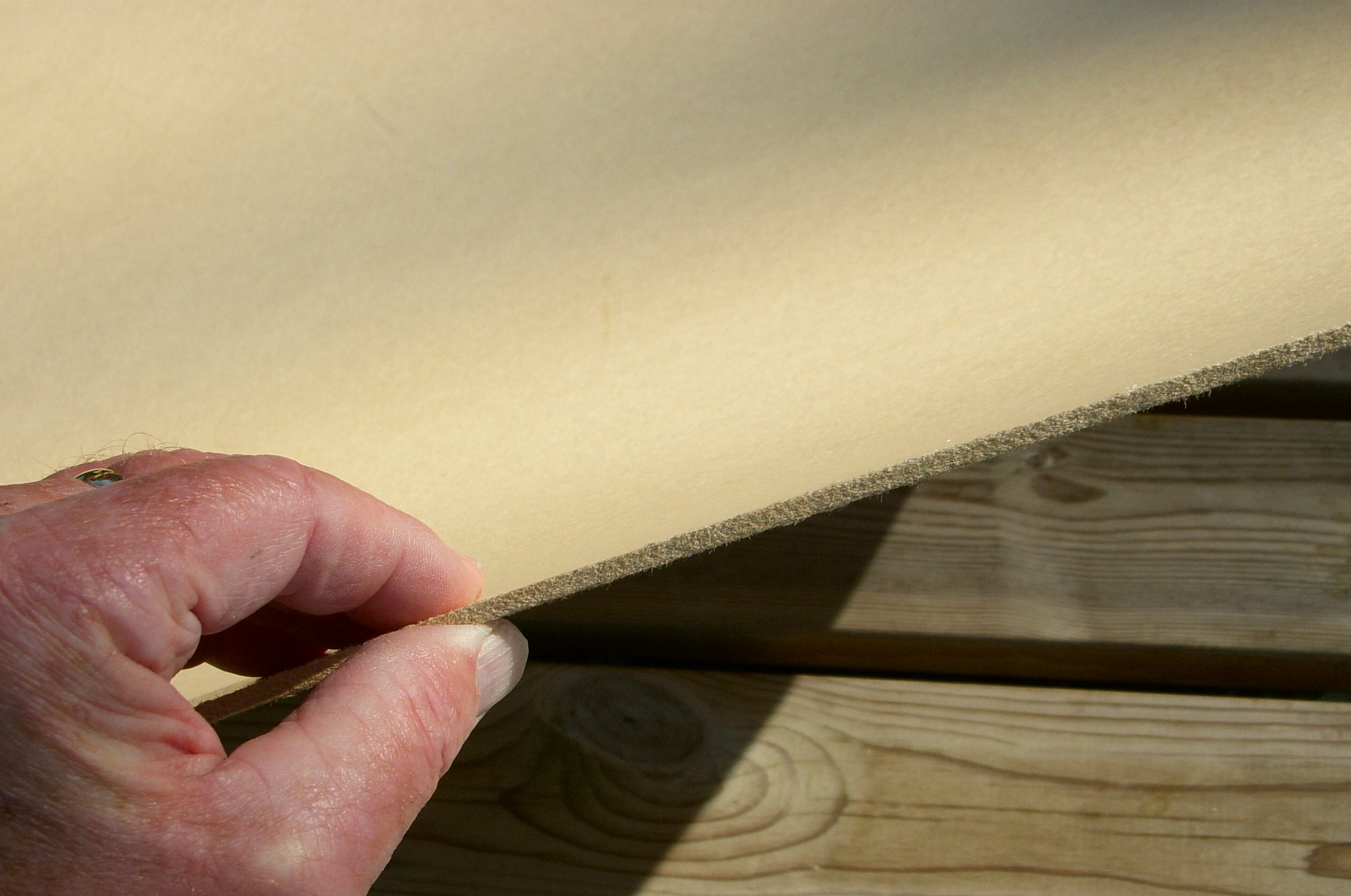 Byggskiva av typ "masonit", 3,4 millimeter (framsidan)